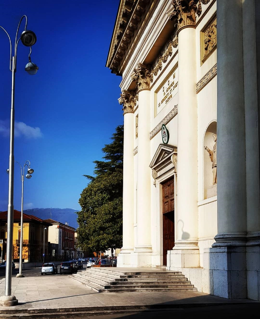 Chiesa di Malo, provincia di Vicenza